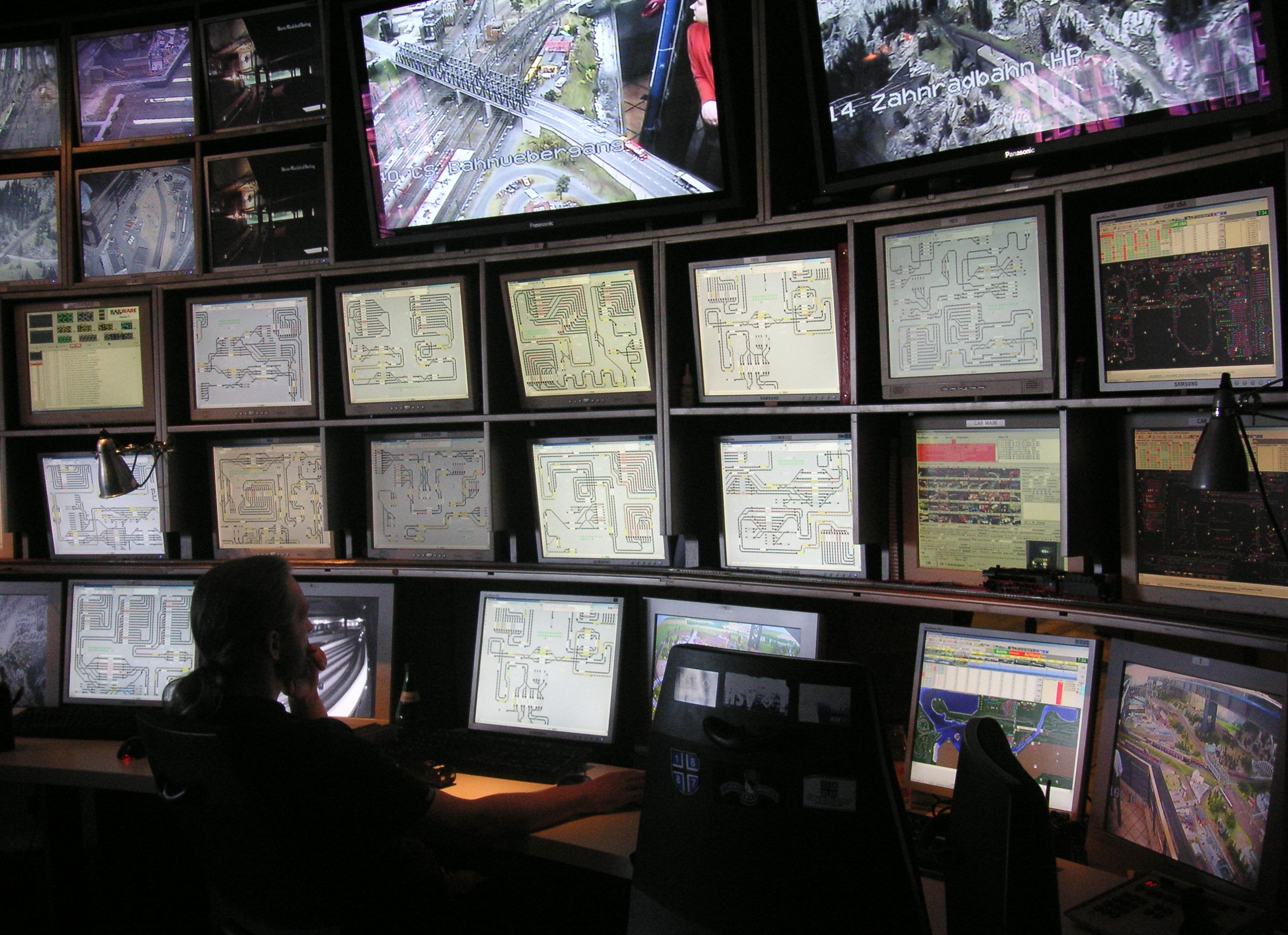 Miniatur Wunderland Kontroll